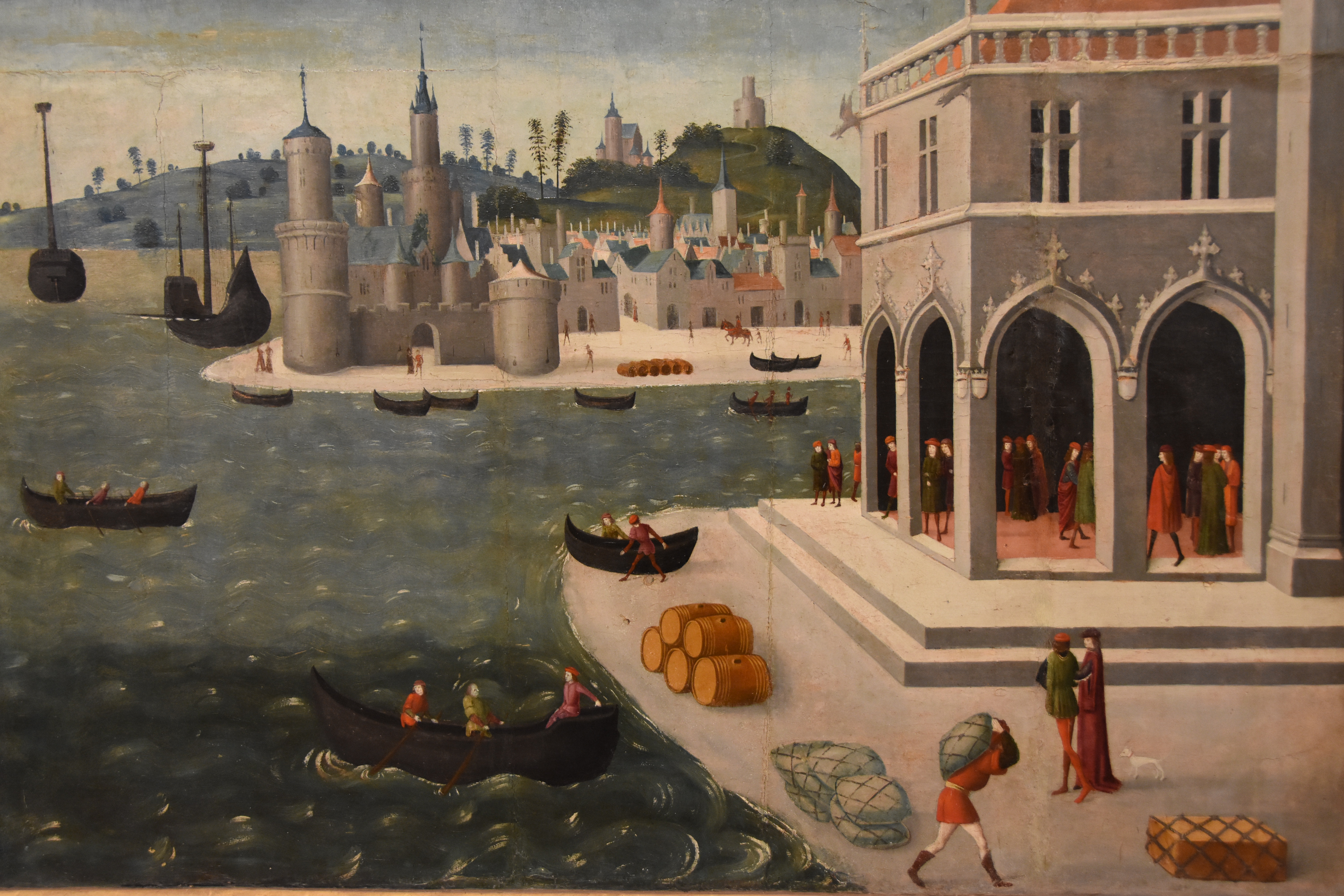 Retaule de la Trinitat. Museu d'art Jacint Rigau, Perpinyà (1489) Detall: Visió imaginada de la llotja de Perpinyà i del port de Cotlliure